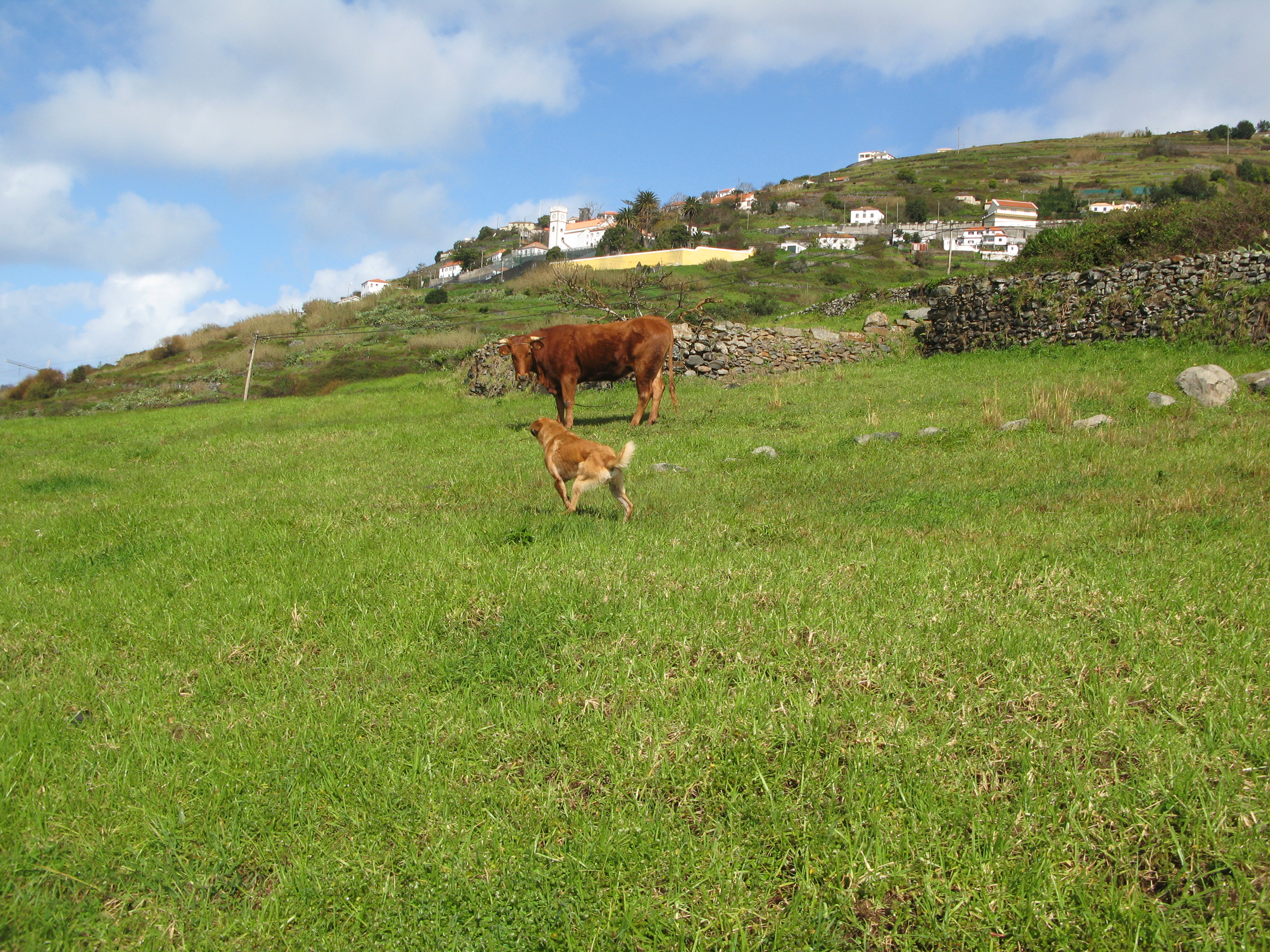 Fajã da Ovelha, Madeira